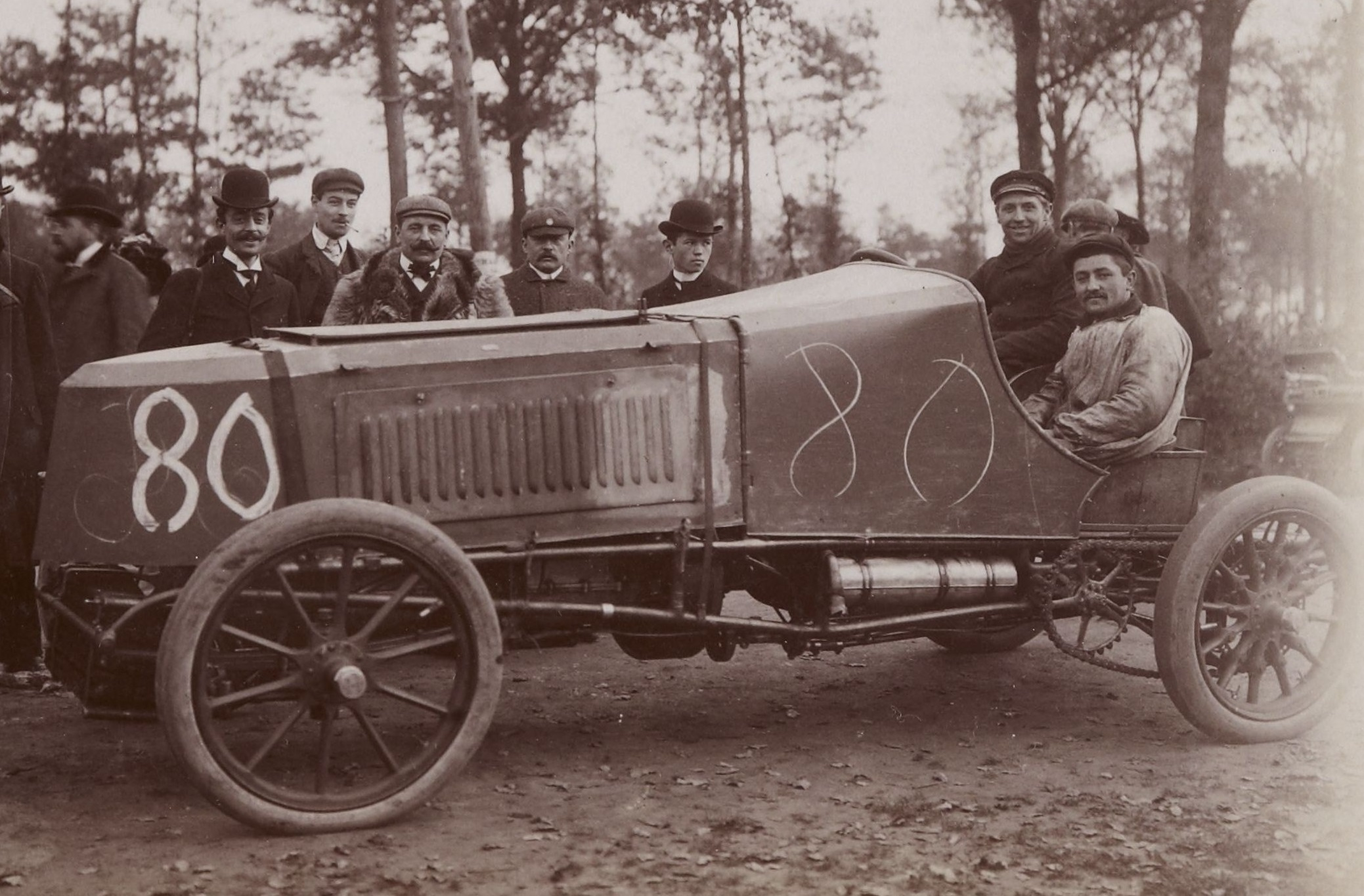 [Collection Jules Beau. Photographie sportive] : T. 24. AnnÃ©es 1903 et 1904 / Jules Beau : F. 3. KilomÃ¨tre, Dourdan, organisÃ© par Le Monde Sportif, 5 novembre 1903